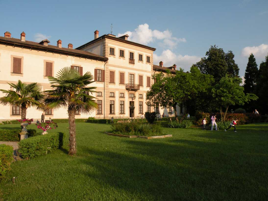 Villa Mari-Resta a Vittuone: visuale della facciata verso il giardino al tramonto